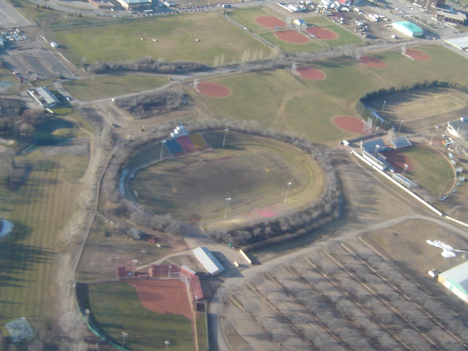 An aerial view of Saskatoon's Gordie Howe Bowl football stadium.